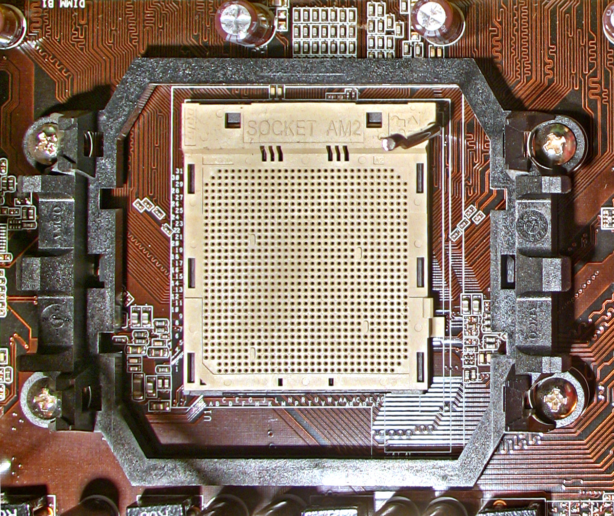 Sockel/Socket AM2/AM2+ für AMD Athlon/Sempron/Phenom X2/X4 CPUs